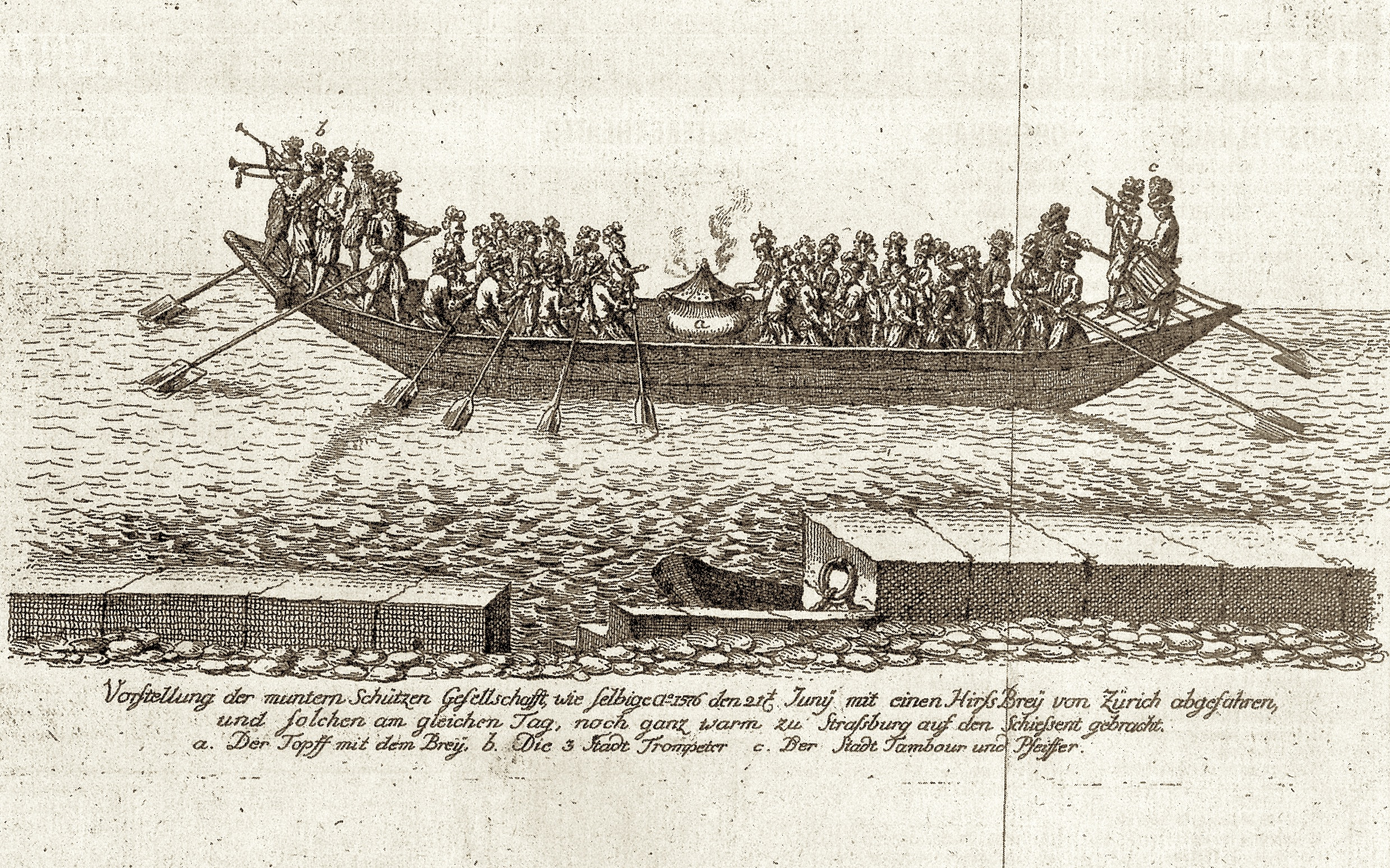 Darstellung der Hirsebreifahrt